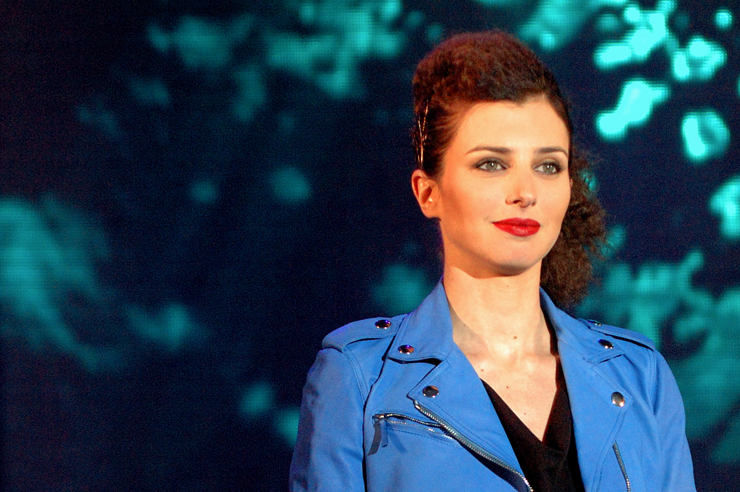 Carolina Di Domenico